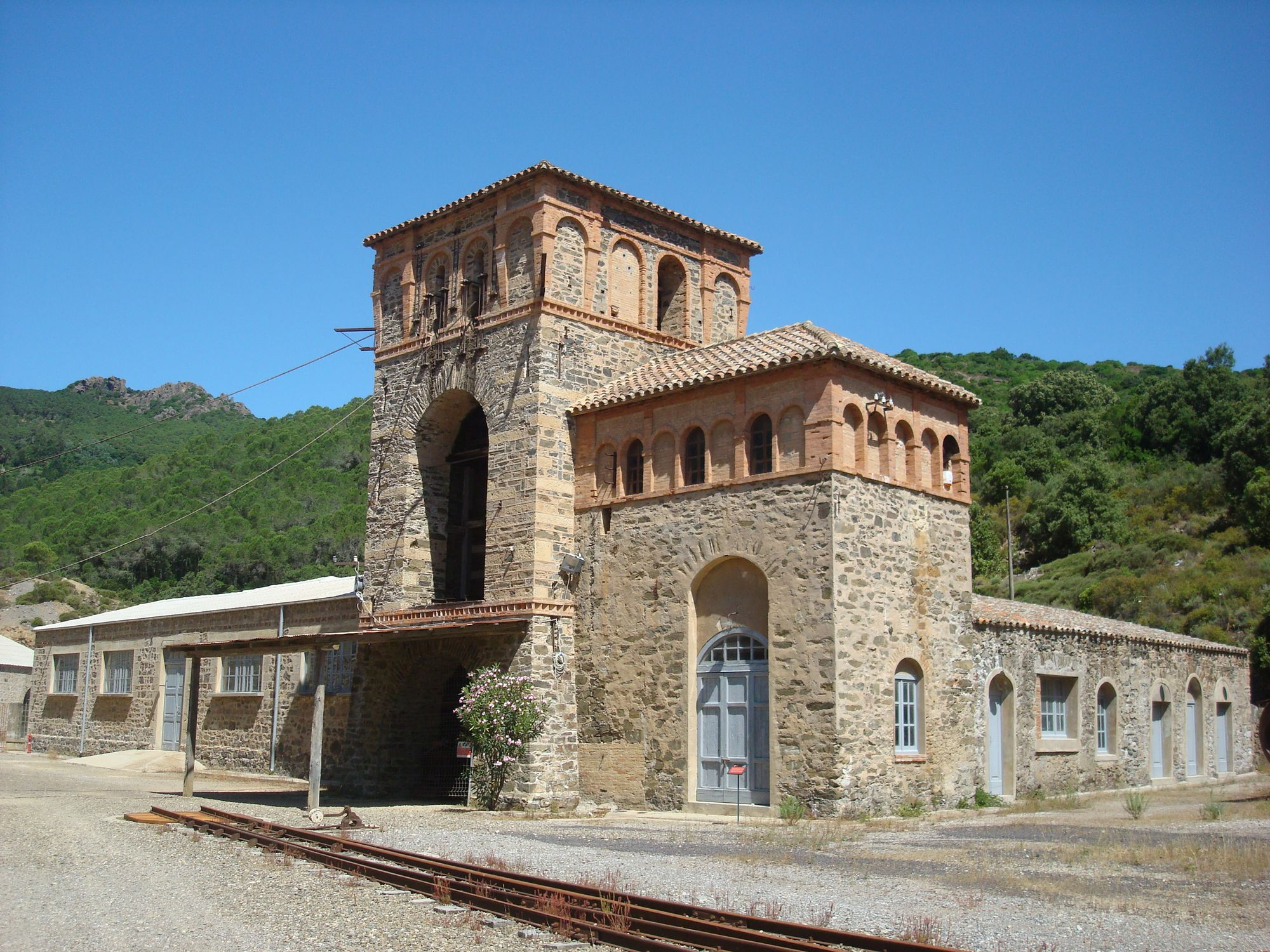 Torre di ingresso al pozzo San Giovanni nel cantiere Piccalinna di Montevecchio (Guspini).